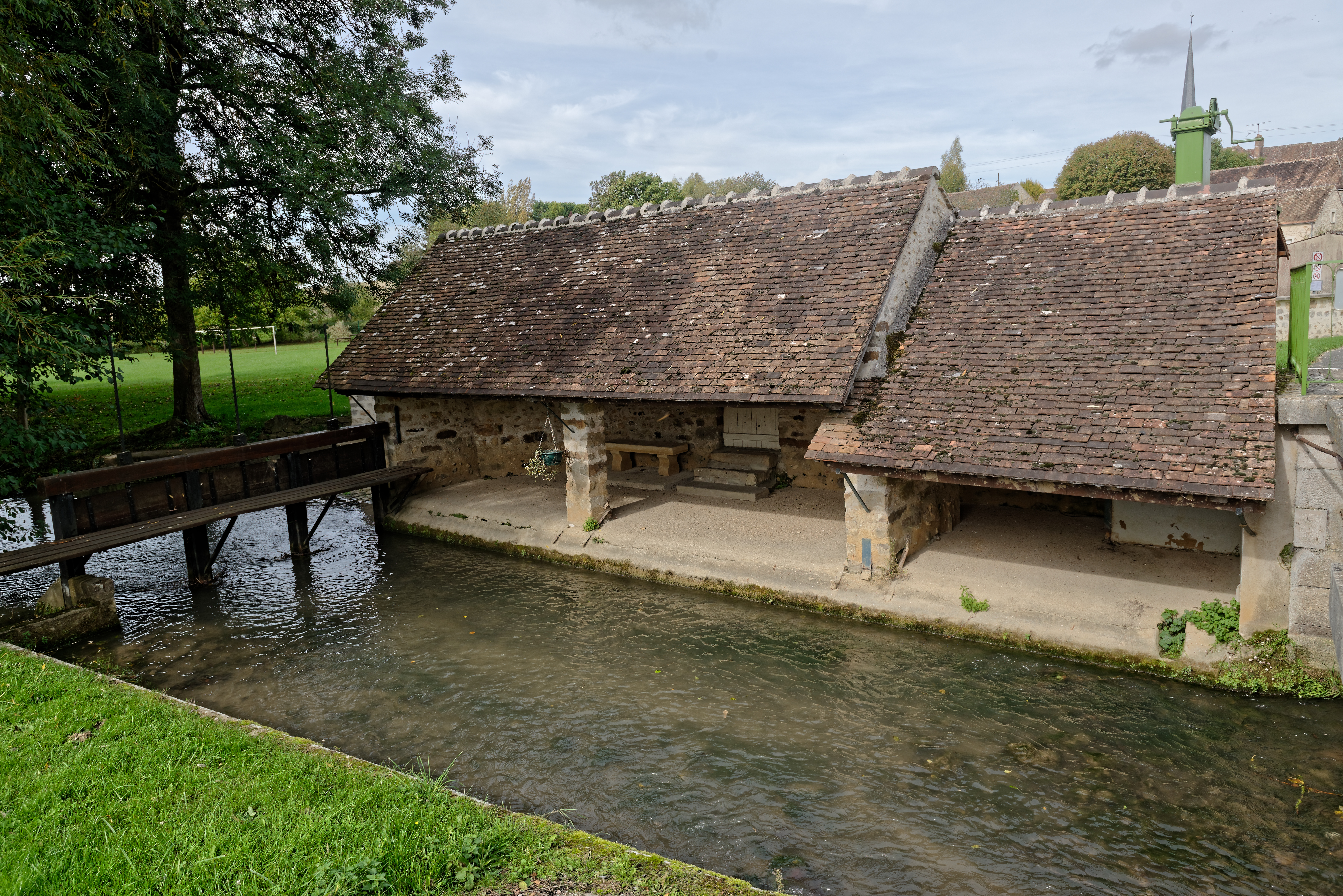 Lavoir sur l'Orvanne près de la plaine de jeux, à la sortie sud de Diant en Seine-et-Marne, région Île-de-France.